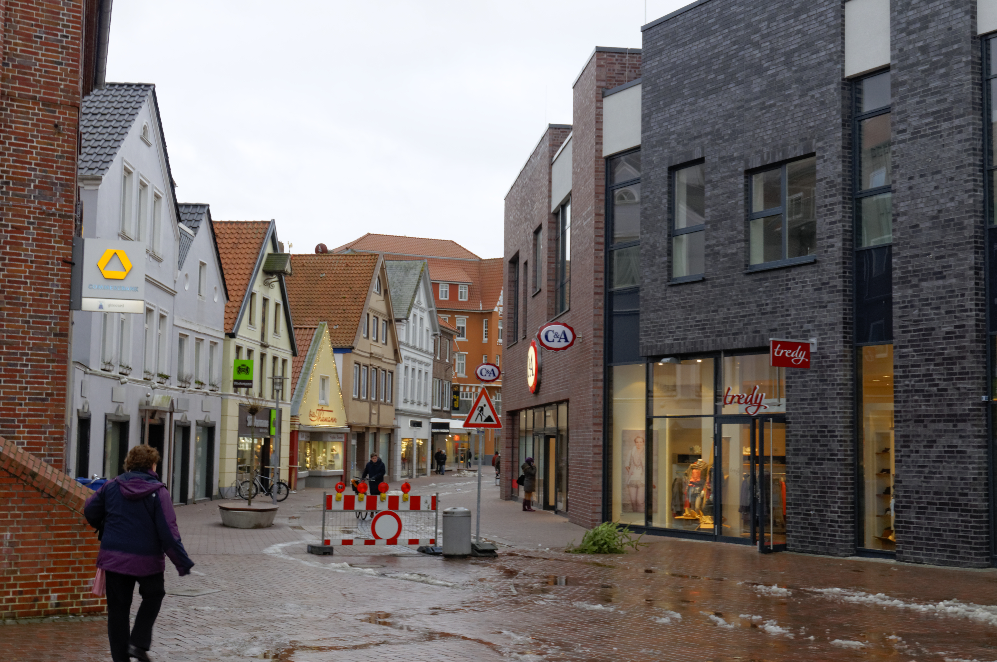 Bilder für die Organisation der AdminCon 2016